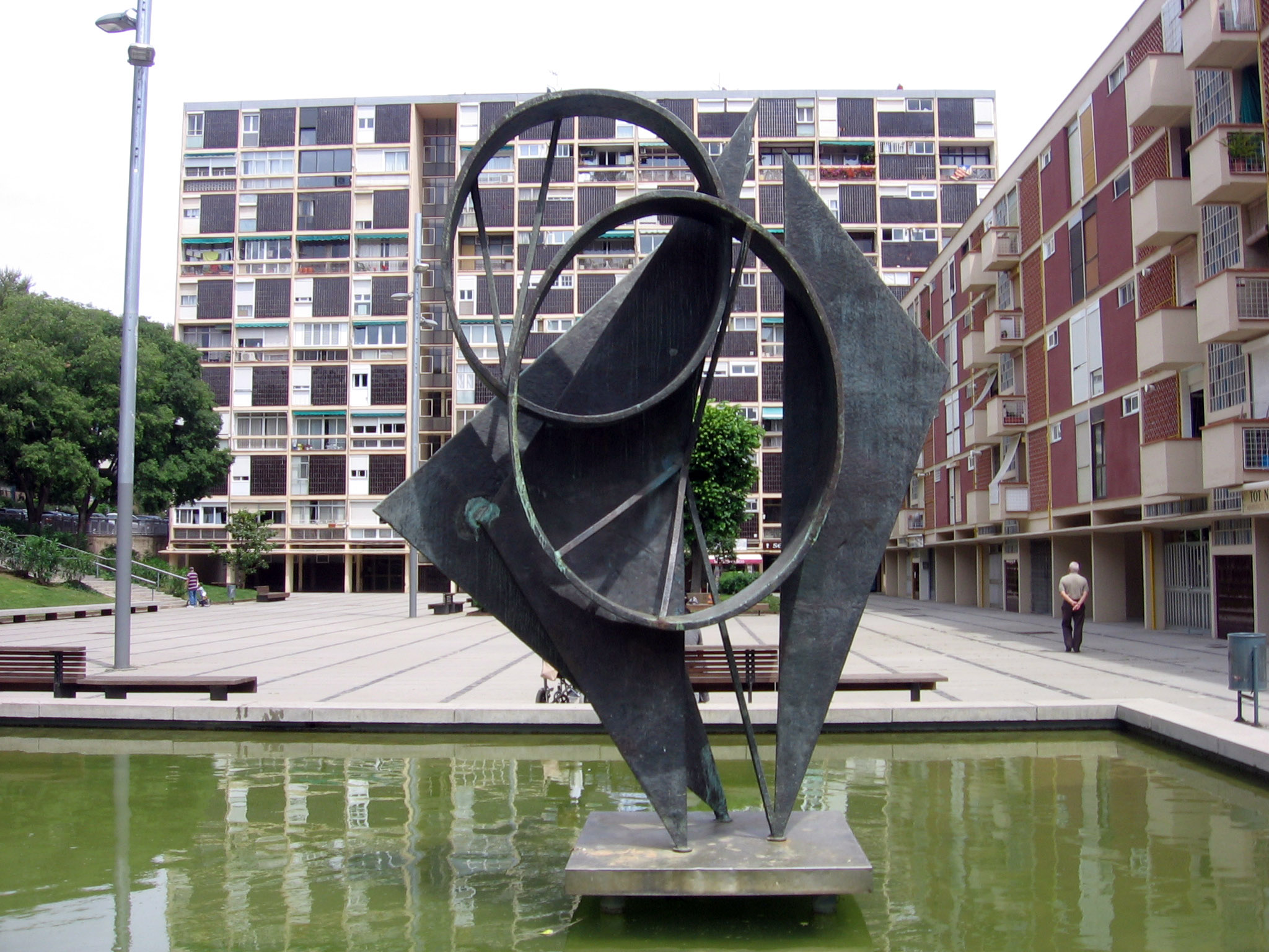 Ritmo y proyección (1961), de Marcel Martí, Plaza de Montbau, Barcelona.